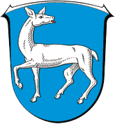 Wappen von Zierenberg